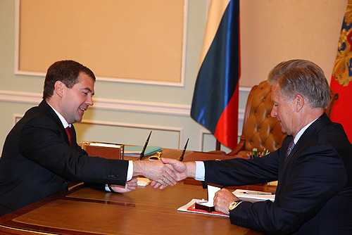 МОСКВА, КРЕМЛЬ. С руководителем Олимпийского комитета России Леонидом Тягачёвым.